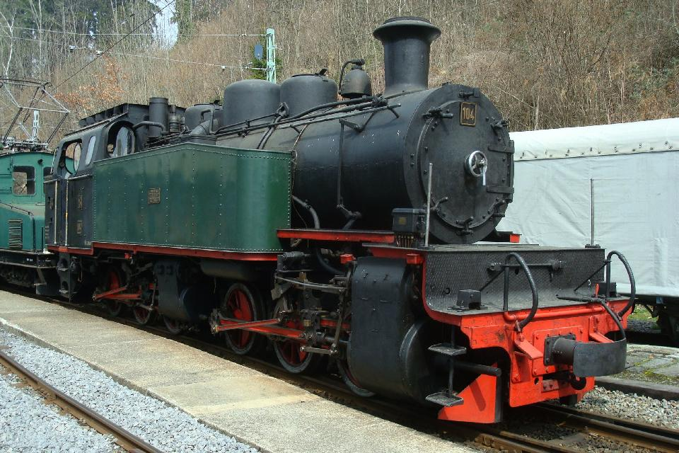 Mallet Dampflokomotive G 2x3/3 104 Zell der ehemaligen Südwestdeutsche Eisenbahn-Gesellschaft (SEG), von der Bahnstrecke Zell im Wiesental–Todtnau, bei der Museumsbahn Blonay-Chamby im Frühling 2010.